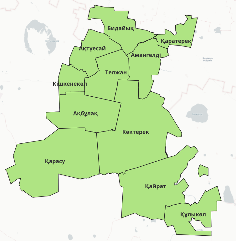 Карта-схема Уаліхановського району сільський округПівнічно-Казахстанської області